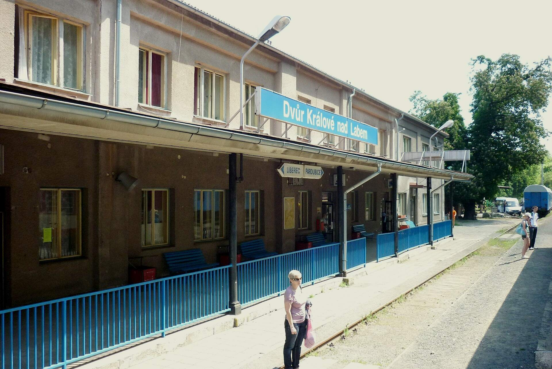 Dvůr Králové nad Labem